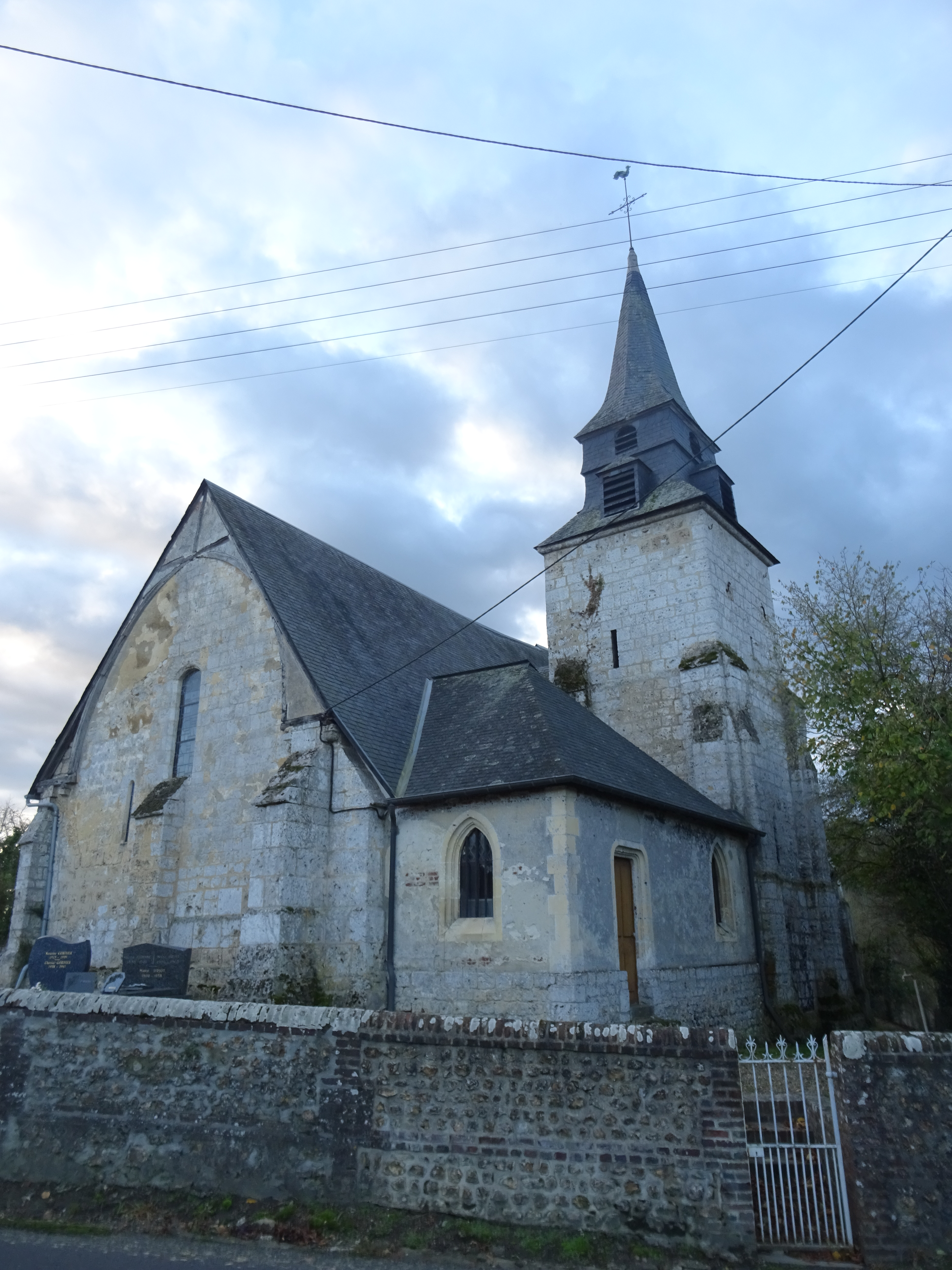 Église Saint-Pierre à Équainville (Fiquefleur-Equainville - Eure - Normandie - France)